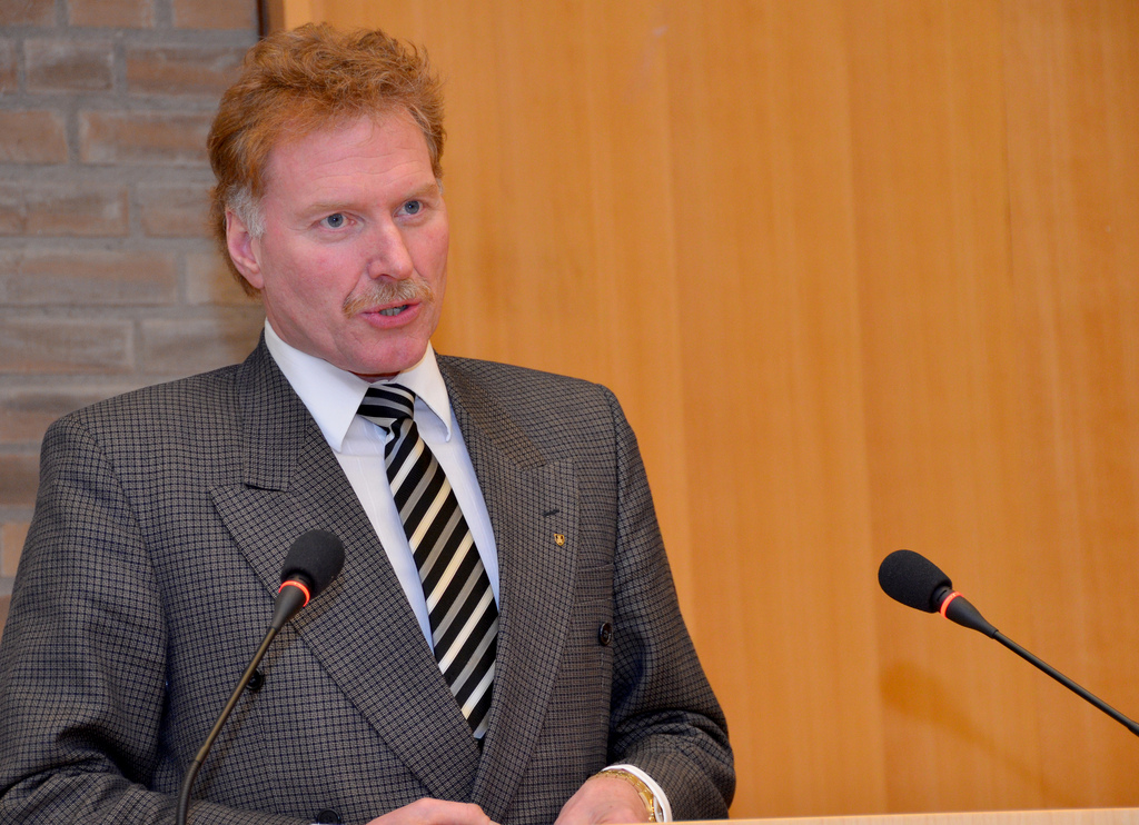 Johnny Ingebrigtsen